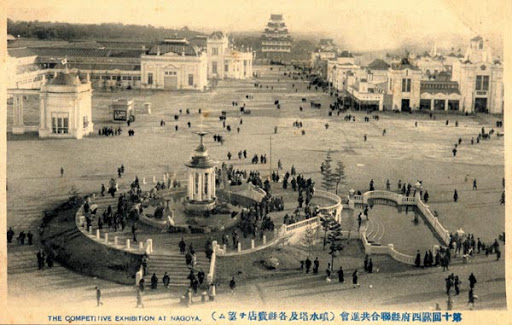 1910年に鶴舞公園で開催された「第10回関西府県連合共進会」。噴水塔。